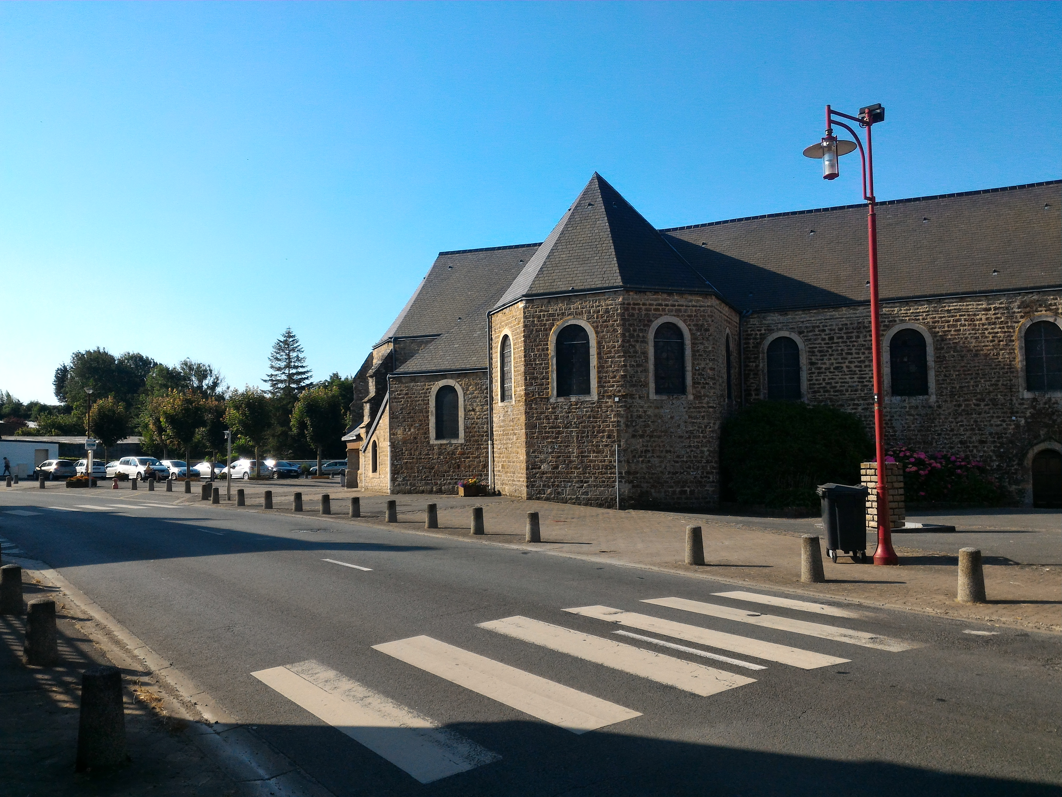 Place et église de Baincthun (Pas-de-Calais, France)